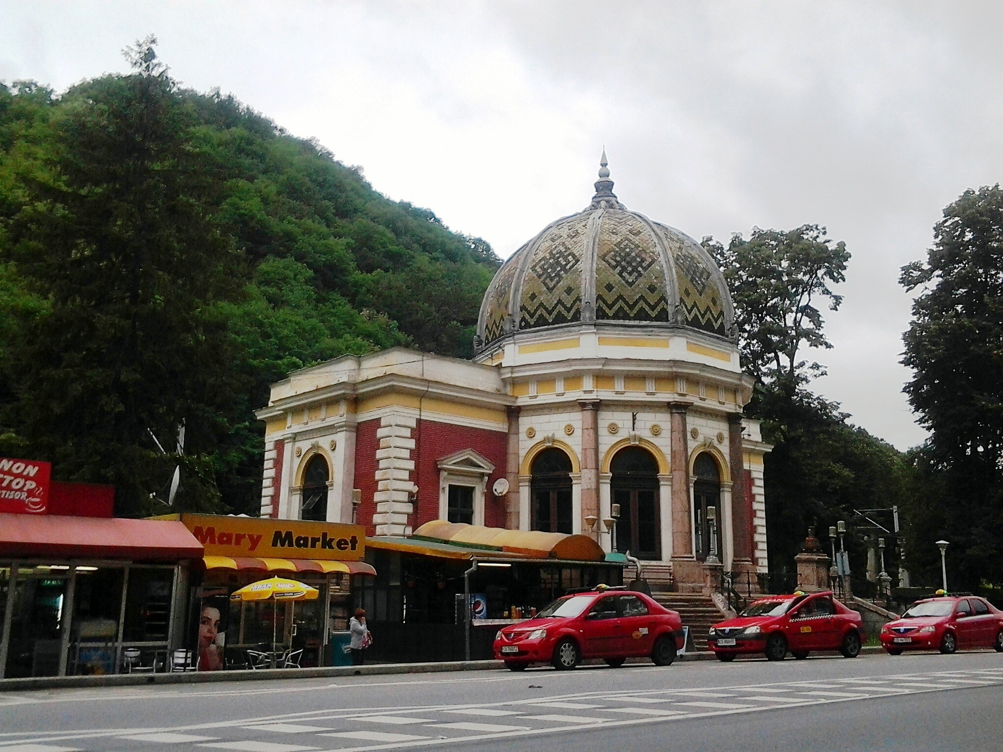 Vedere generala din patele garii.